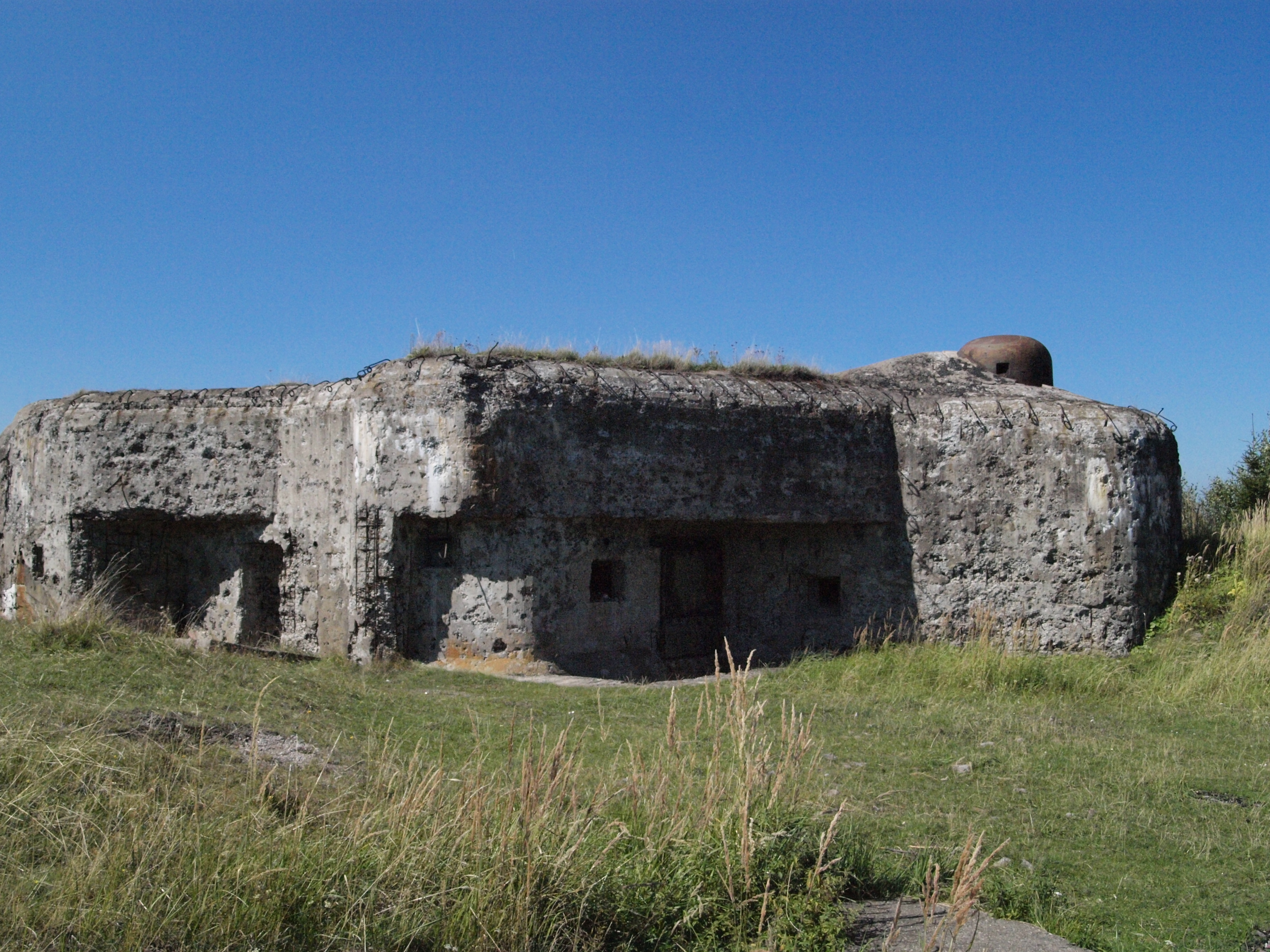 Zkušební a výcvikový objekt CE týl celkový pohled